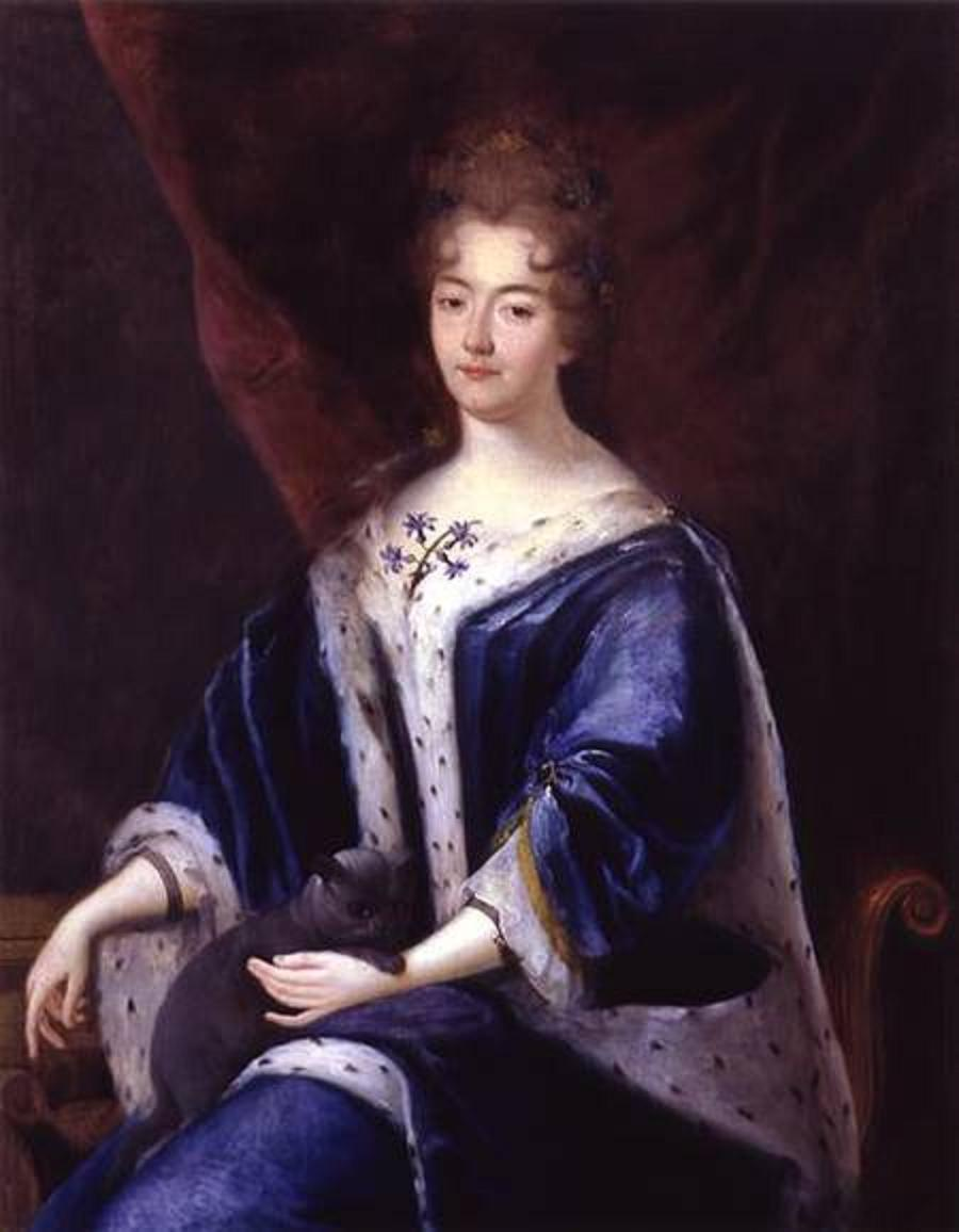 Portrait de Paule Françoise Marguerite de Gondi, duchesse de Lesdiguières